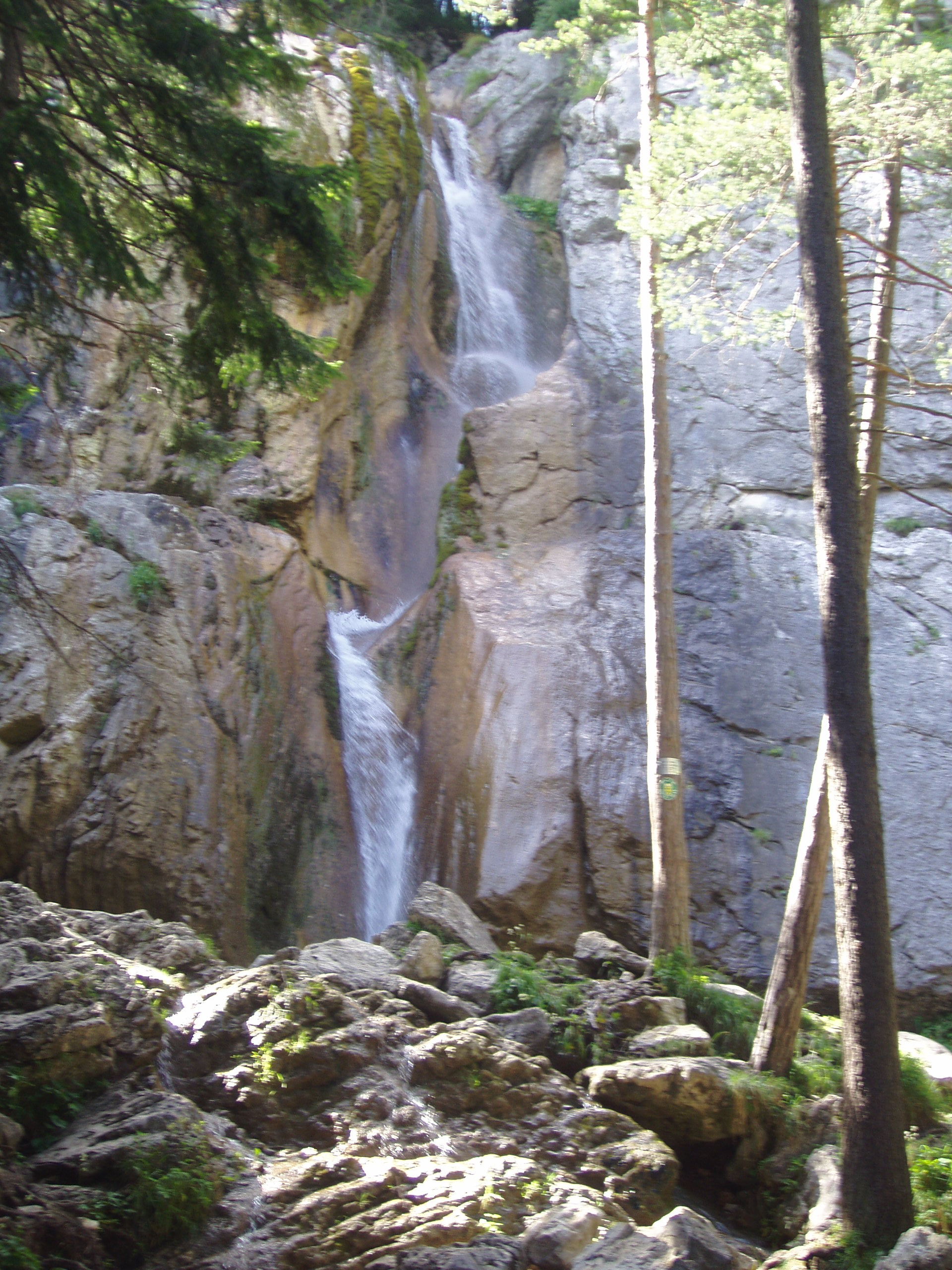 Der Wasserfall in Puchberg am Schneeberg This media shows the natural monument in Lower Austria with the ID NK-107.